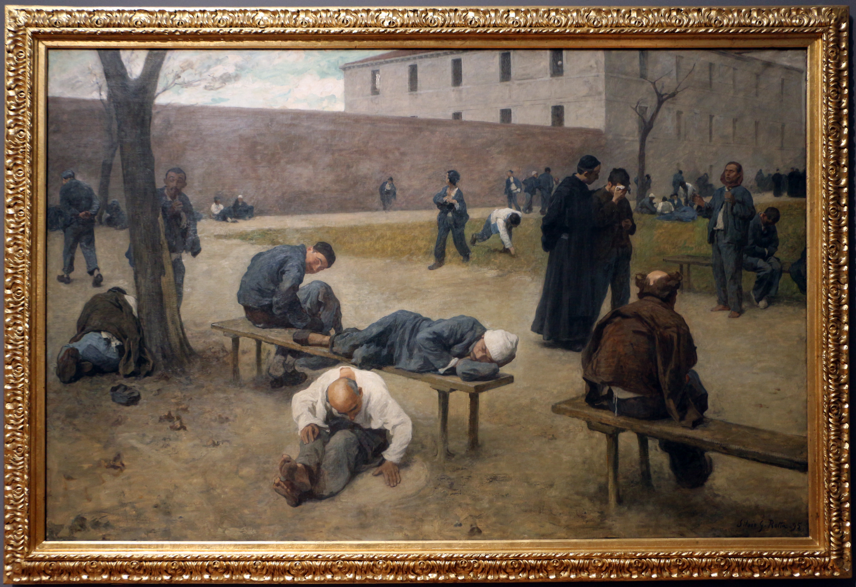 Paintings in the Galleria nazionale d'arte moderna (Rome) This is a photo of a monument which is part of cultural heritage of Italy.